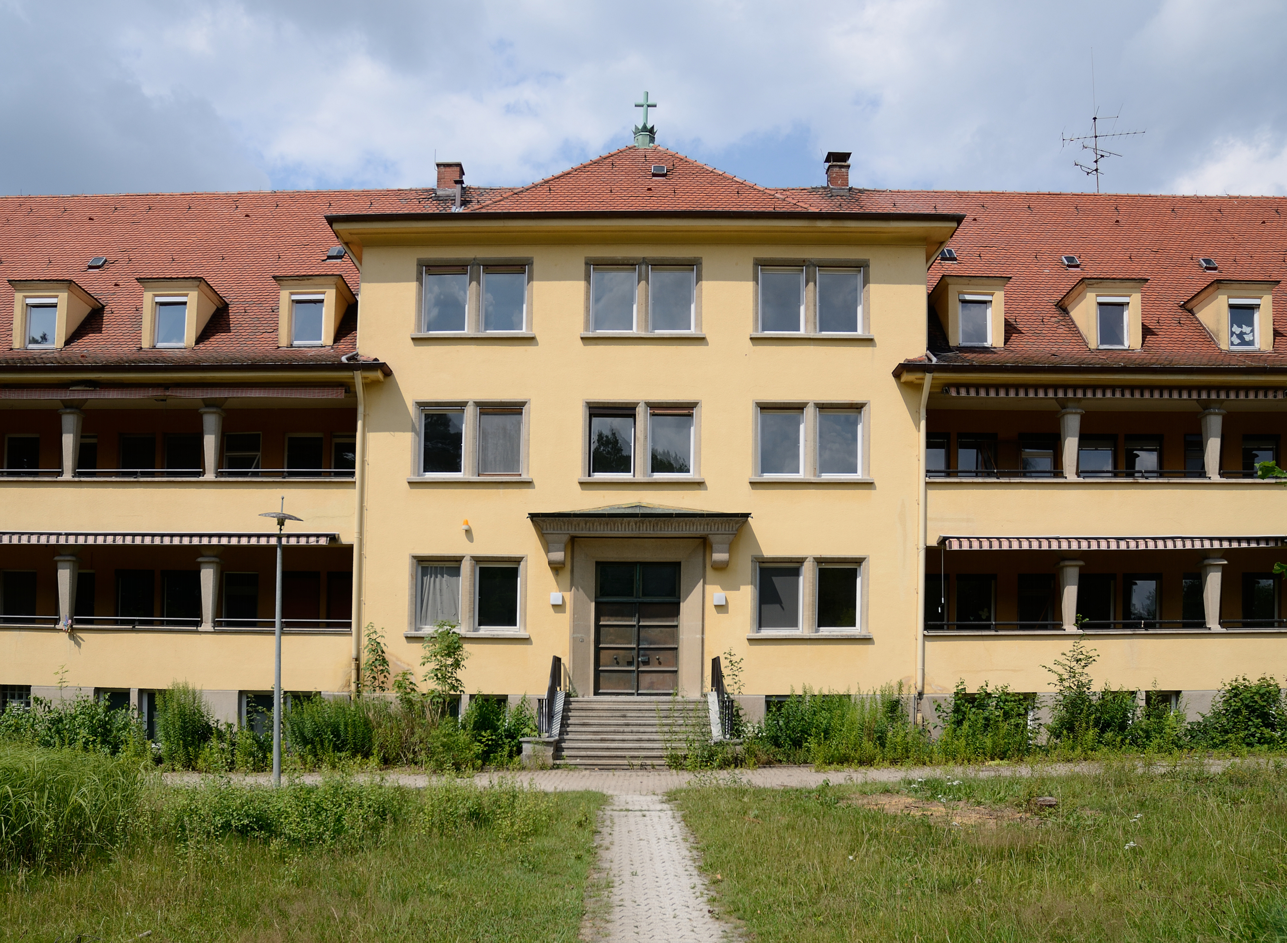 Südseite und Eingangsbereich des Friedenshortes, Neuendettelsau